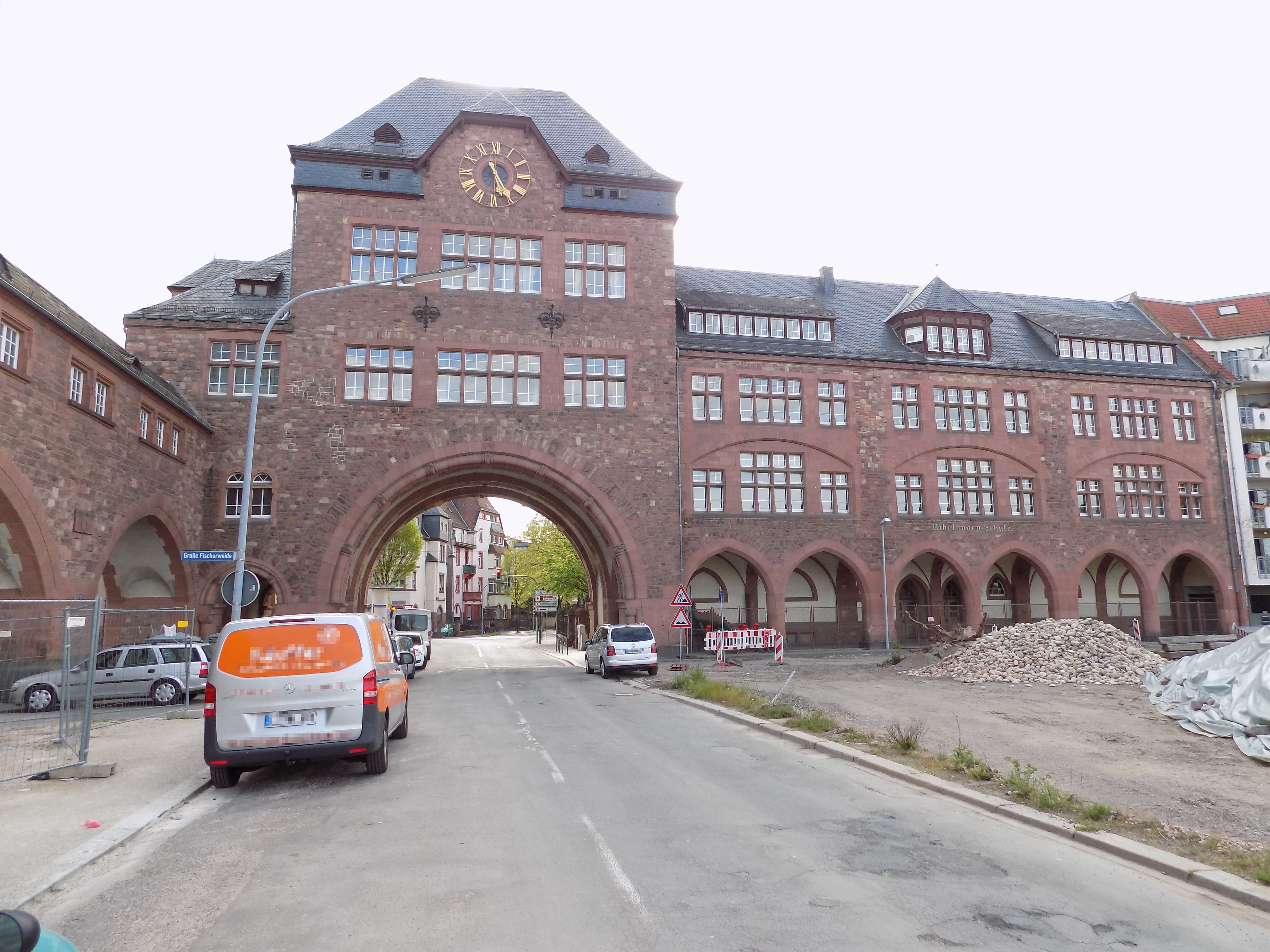 Nibelungenschule Worms vom Osten aus